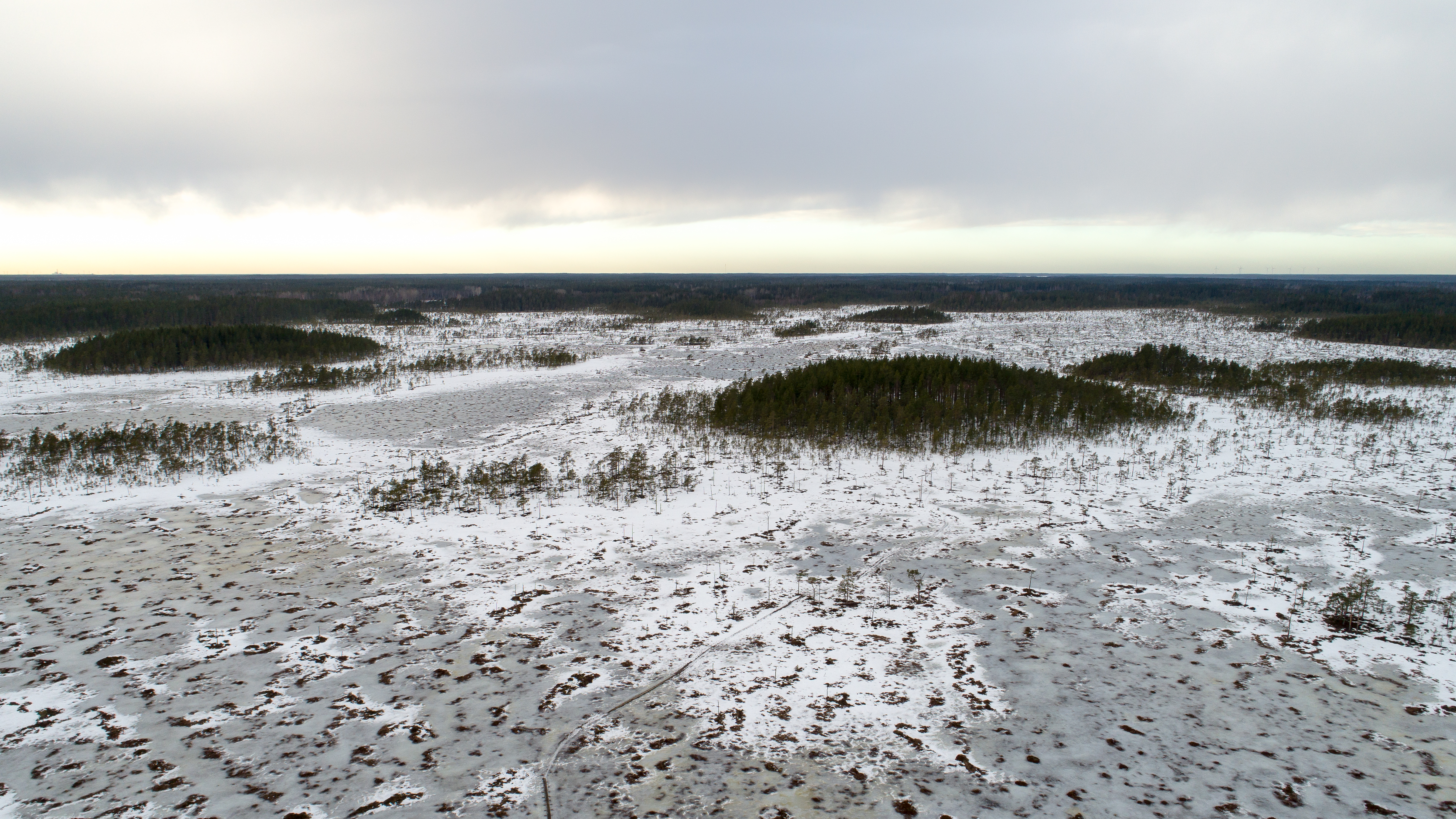 Läntinen Isoneva talvella. Kuvassa näkyy lintutornille vievä retkeilyreitti pitkospuineen.